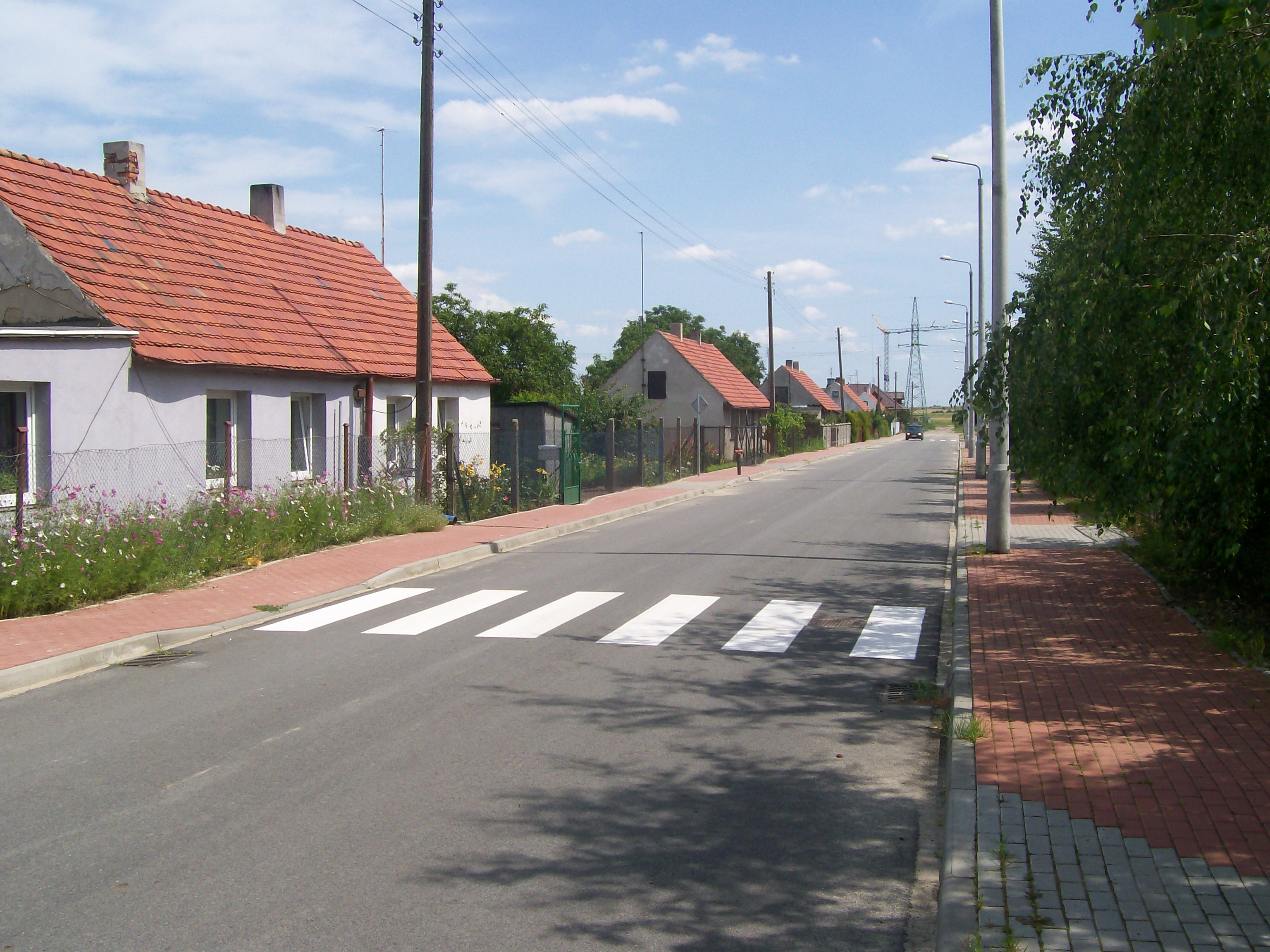 Ul. Ludowa